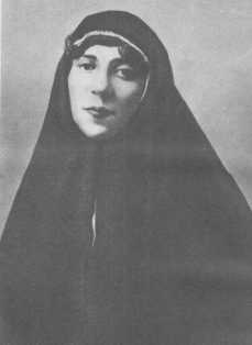 Софья Захаровна ФЕДОРЧЕНКО (1880-1959)- русская писательница